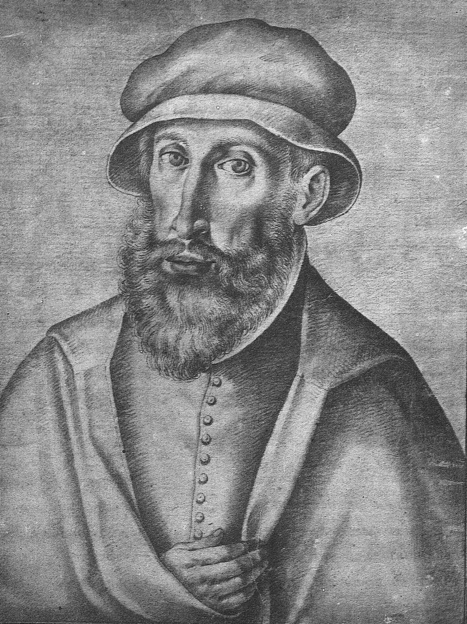 Detalle del retrato de Pedro Mexía en Francisco Pacheco, (1564-1644) El libro de descripción de verdaderos retratos, ilustres y memorables varones, [Sevilla, s.n., s.a.]- Real Academia de la Historia (Madrid). Signatura: 1/736